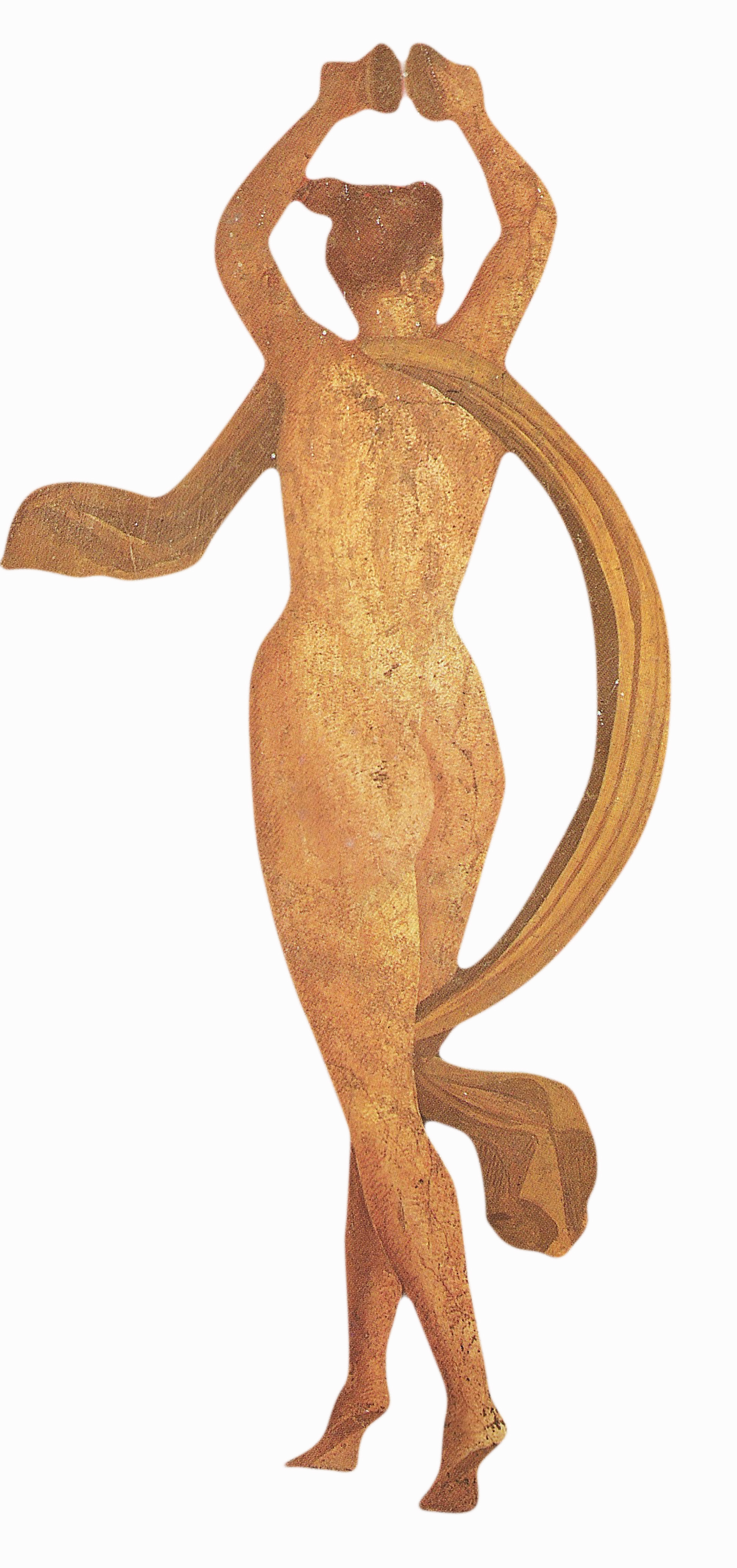 Menade danzante che suona i cimbali. Particolare di un affresco presso la Villa dei Misteri a Pompei, 60 a.C. ca.